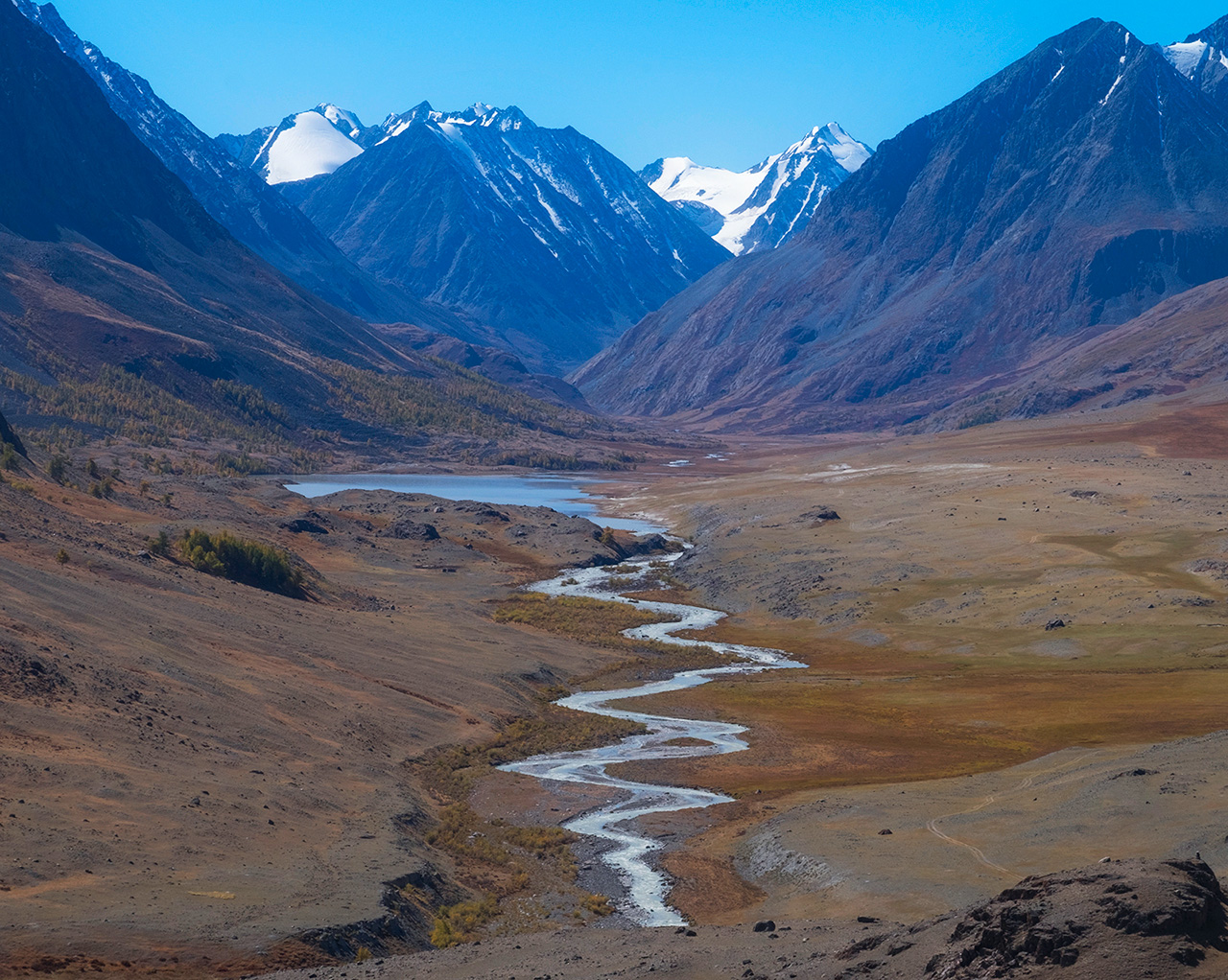 Река Аккол вытекает из озера Акколь